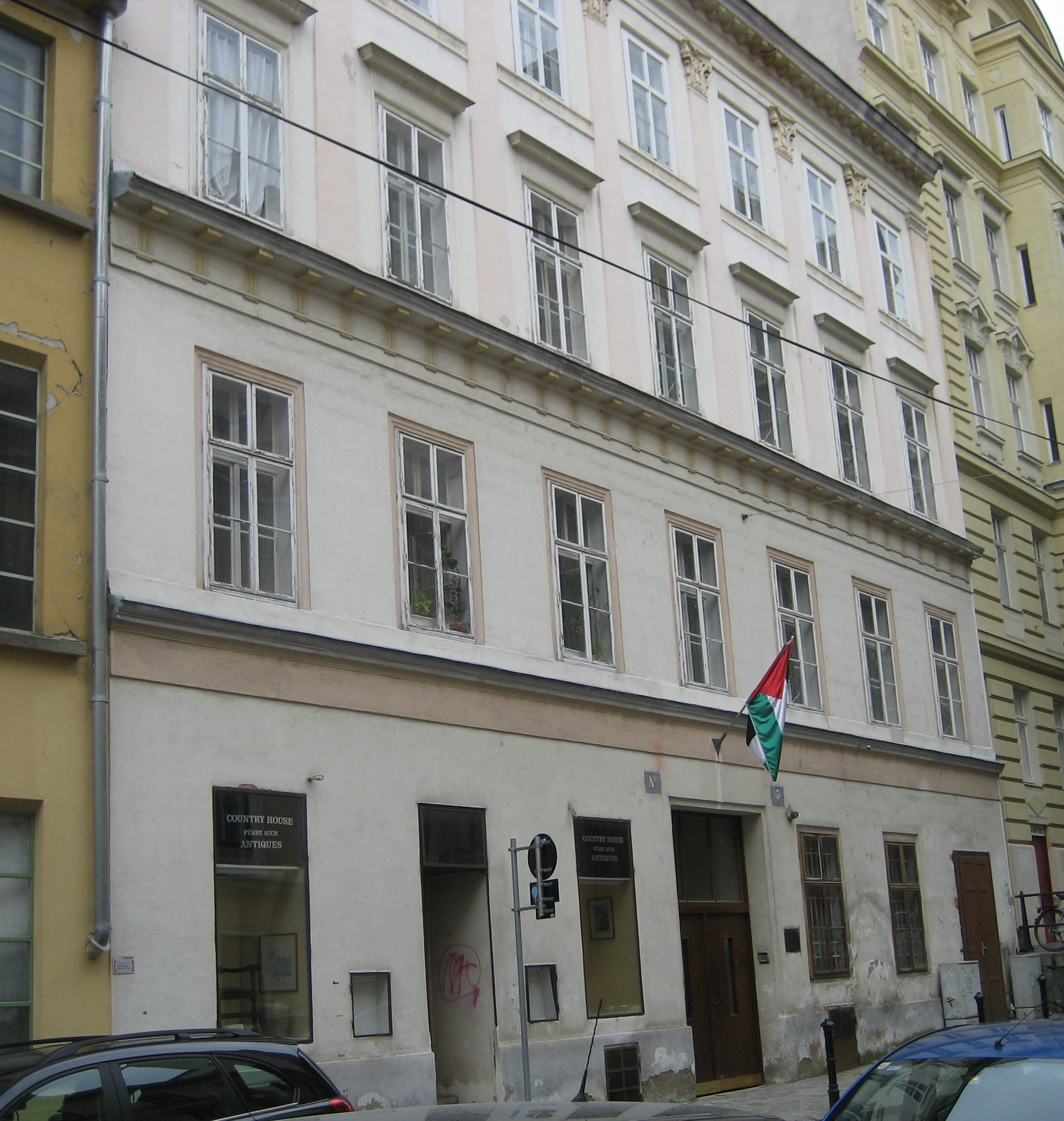 das Haus Josefsgasse 5 in der Josefstadt, in Wien